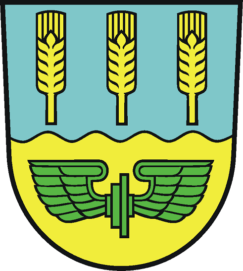 Wappen der Gemeinde Bad Kleinen